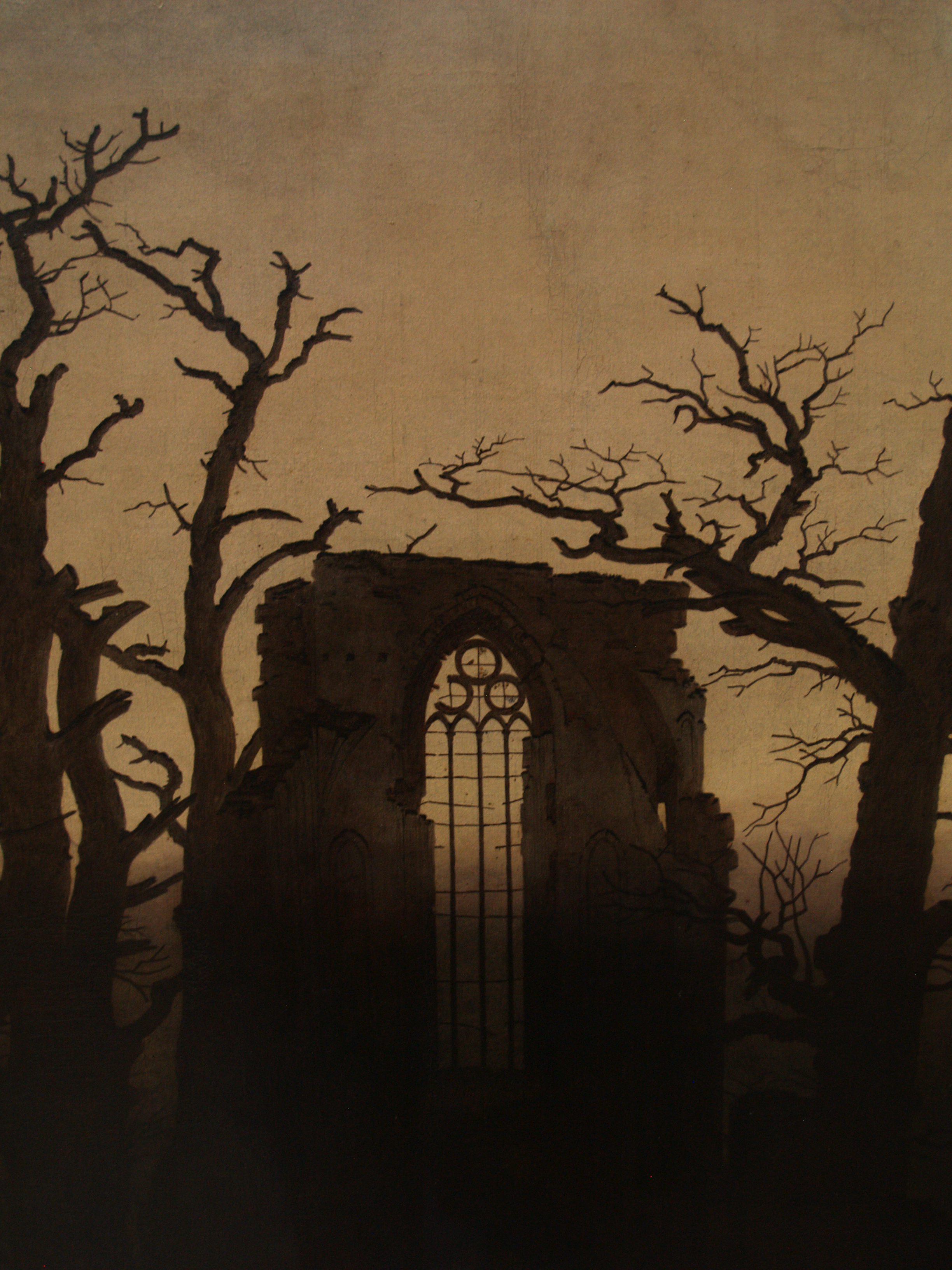 Ruinas de una abadía. Caspar David Friedrich. Berlín, Alte Nationalgalerie.